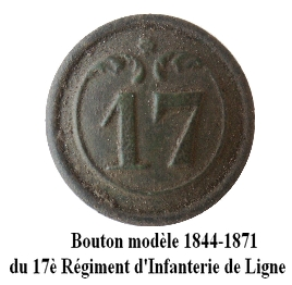 Bouton petit module du 17è Régiment d'Infanterie de Ligne, modèle 1844-1871